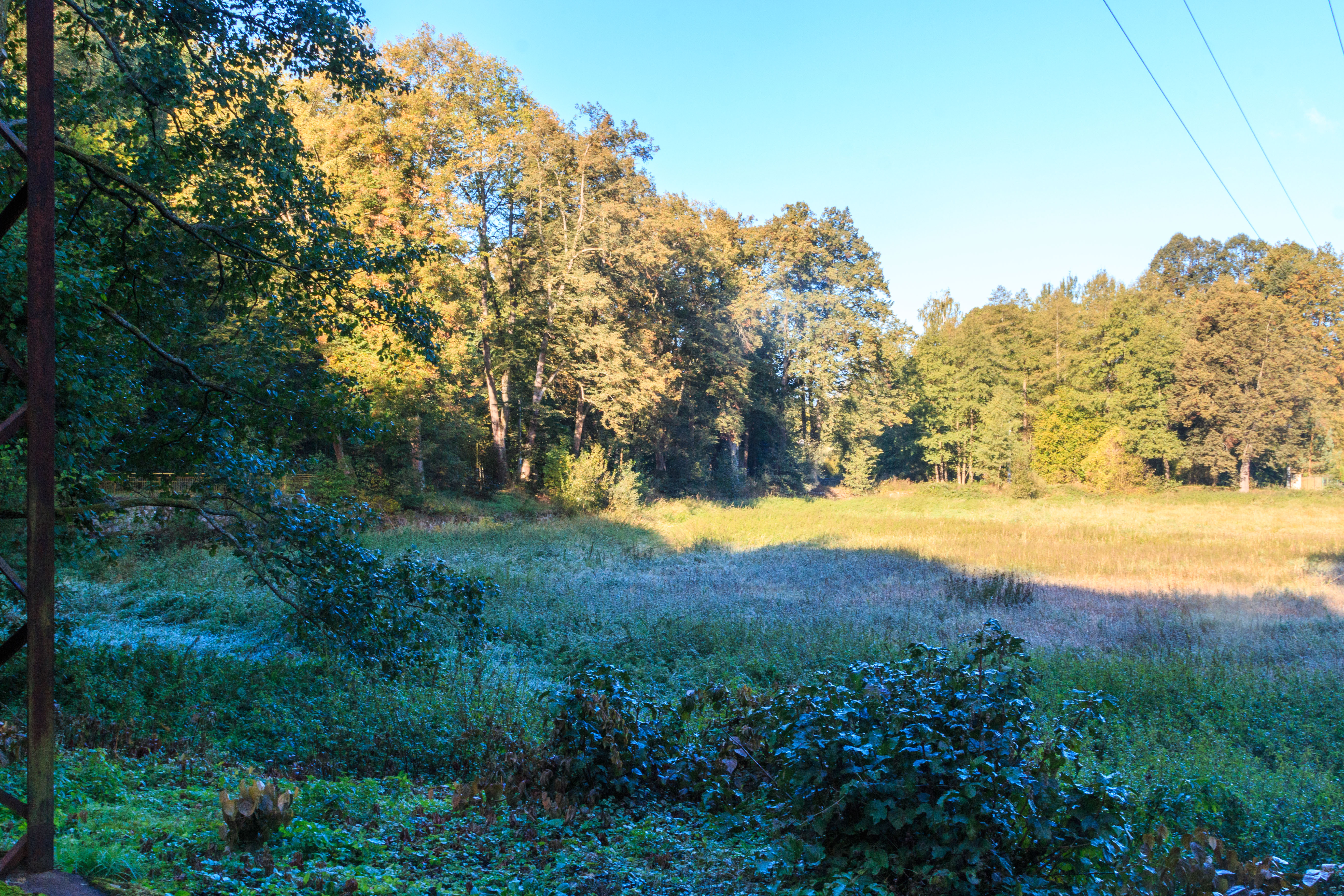 Pivovarský rybník ve Lvové Project: Vodstvo